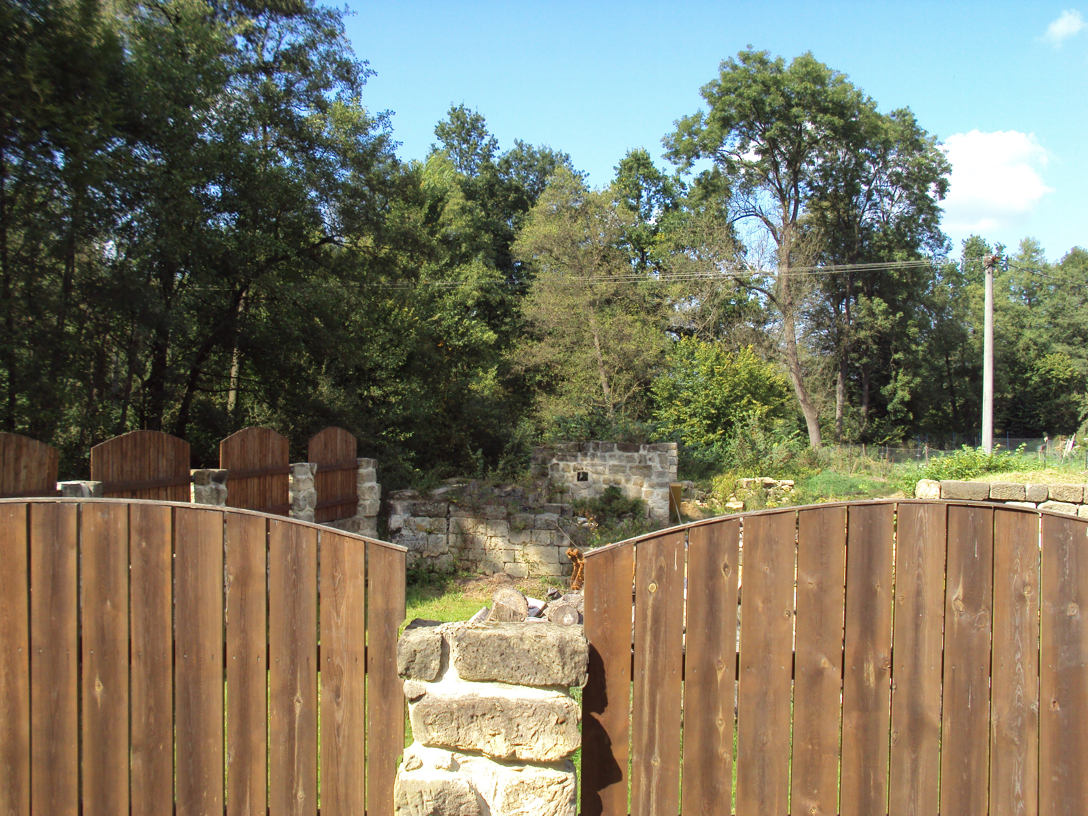 Zrušený Brennský mlýn na Ploučnici pod obcí Brenná u Zákup